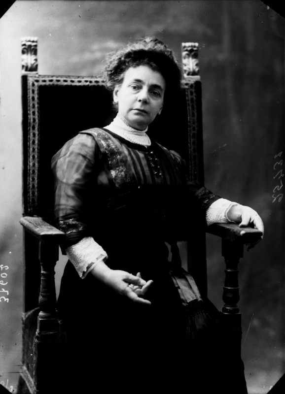 Dora Melegari fotografata da Mario Nunes Vais